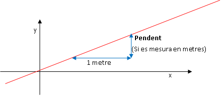 Definicó del pendent d'una recta